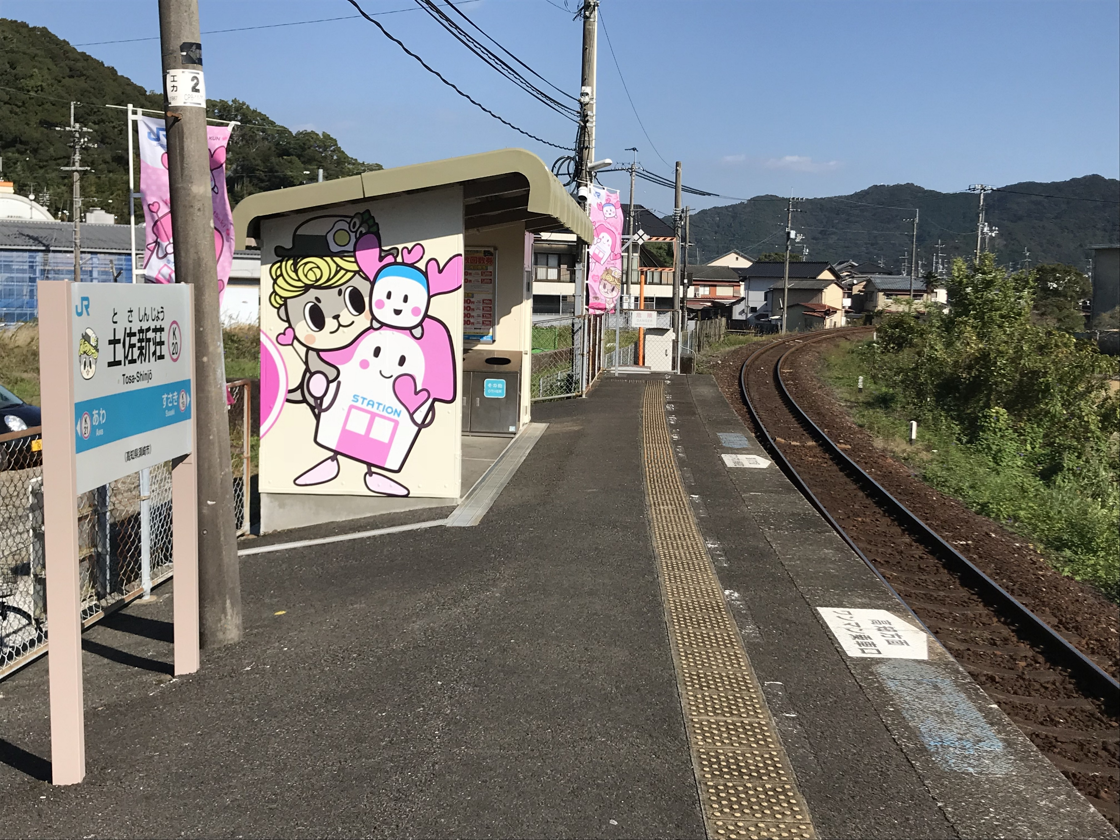 高知県須崎市 土佐新荘駅